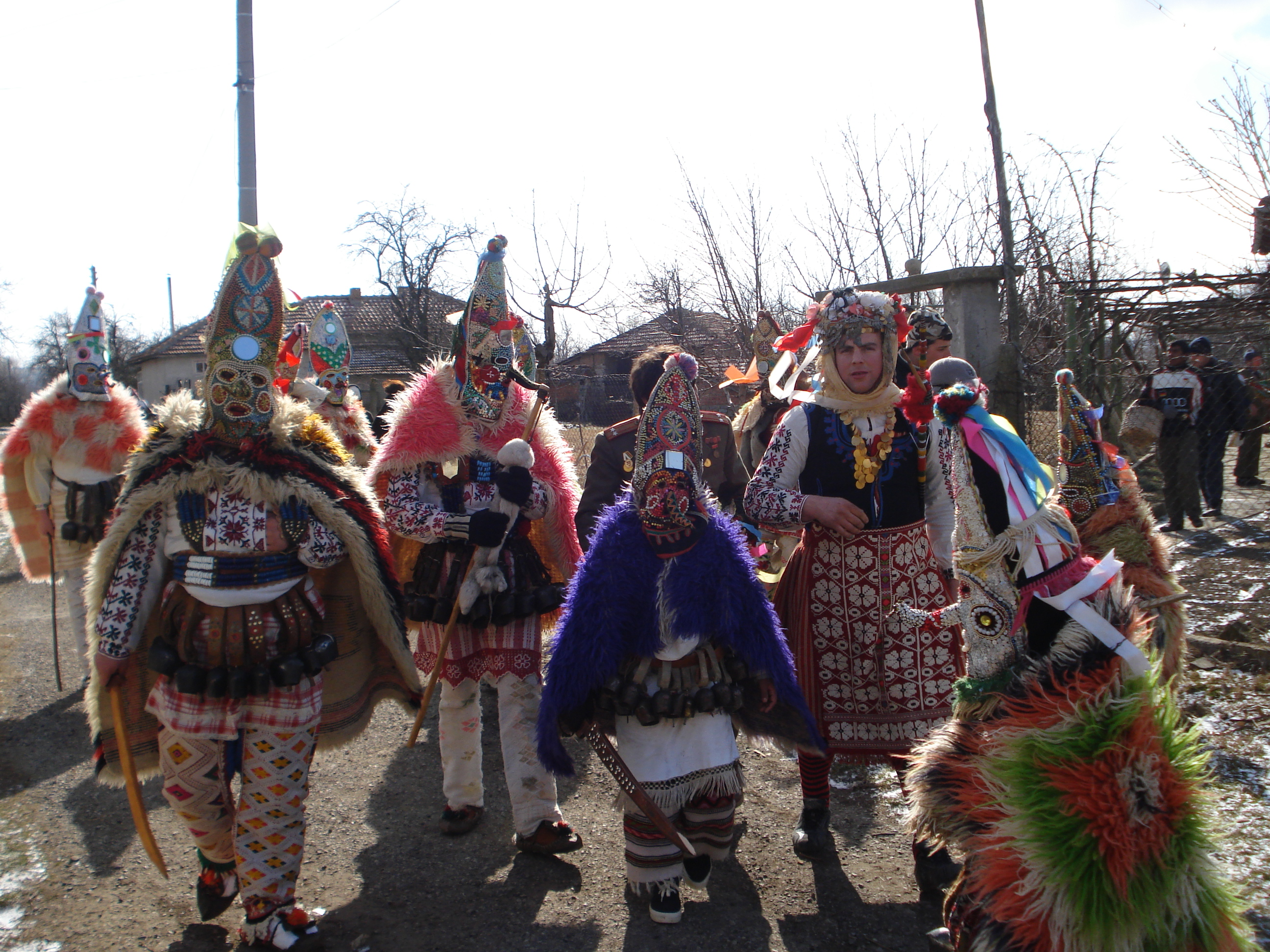 Кукерски игри